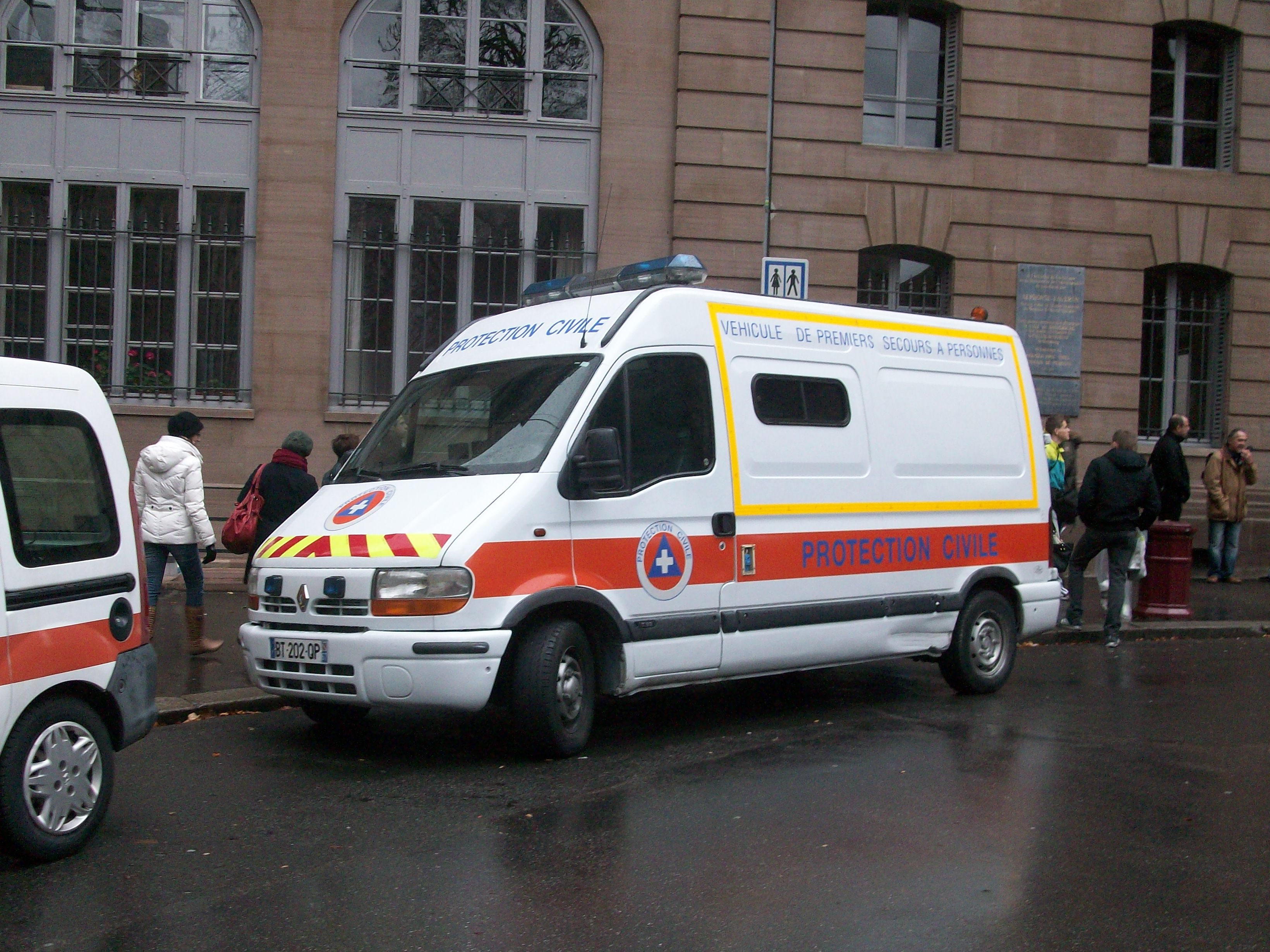 Renault Master de la protection civile, lors du marché de Noël 2011- Strasbourg